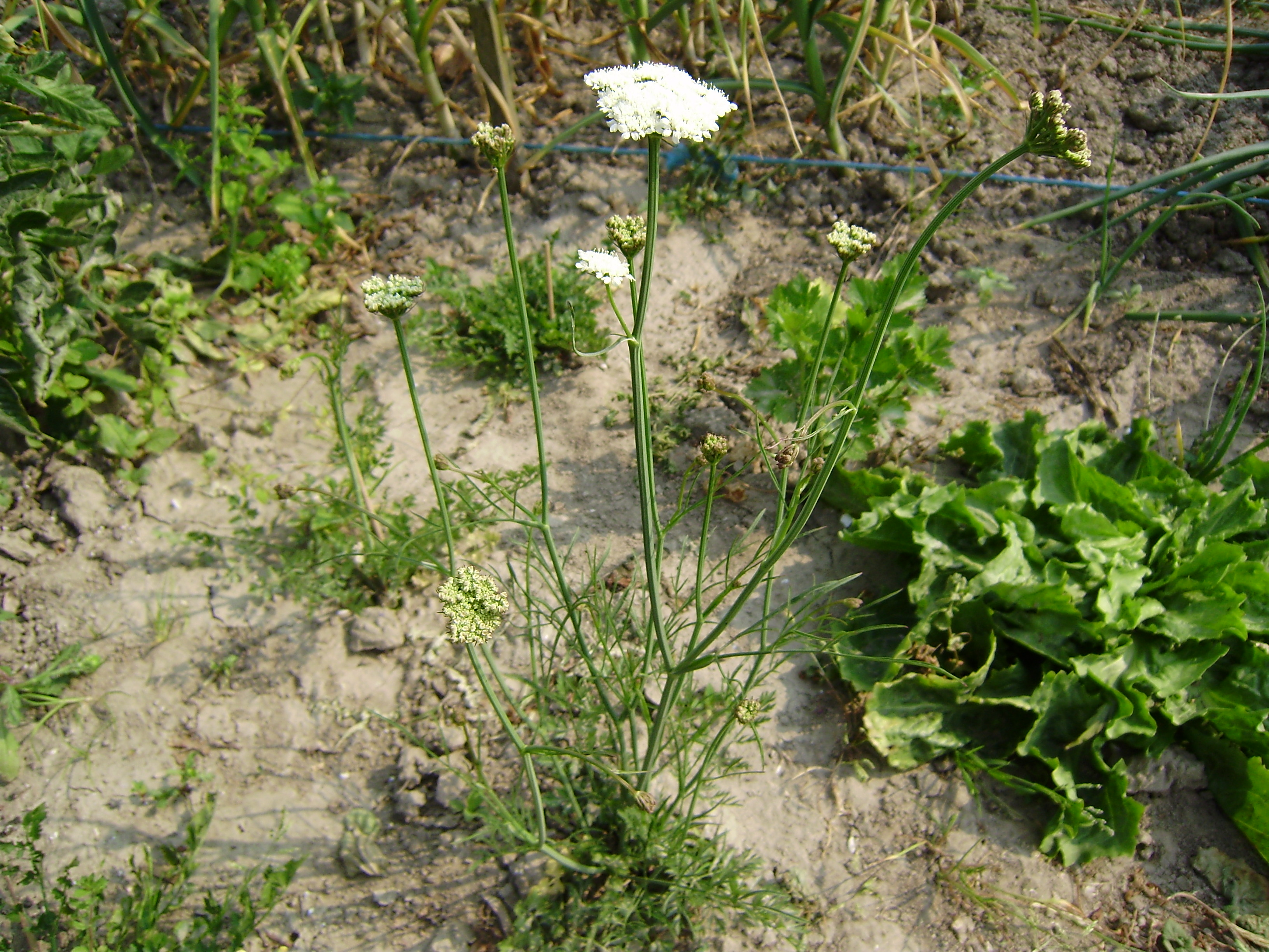 Oenanthe peucedaniifolia aardkastanje